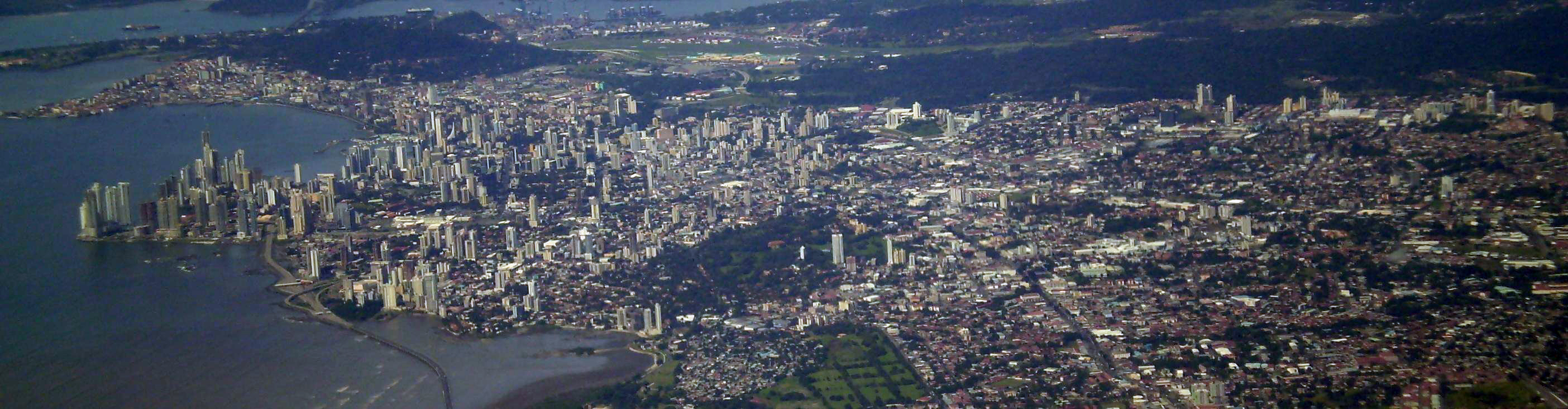 Panorama del centro de la ciudad de Panamá